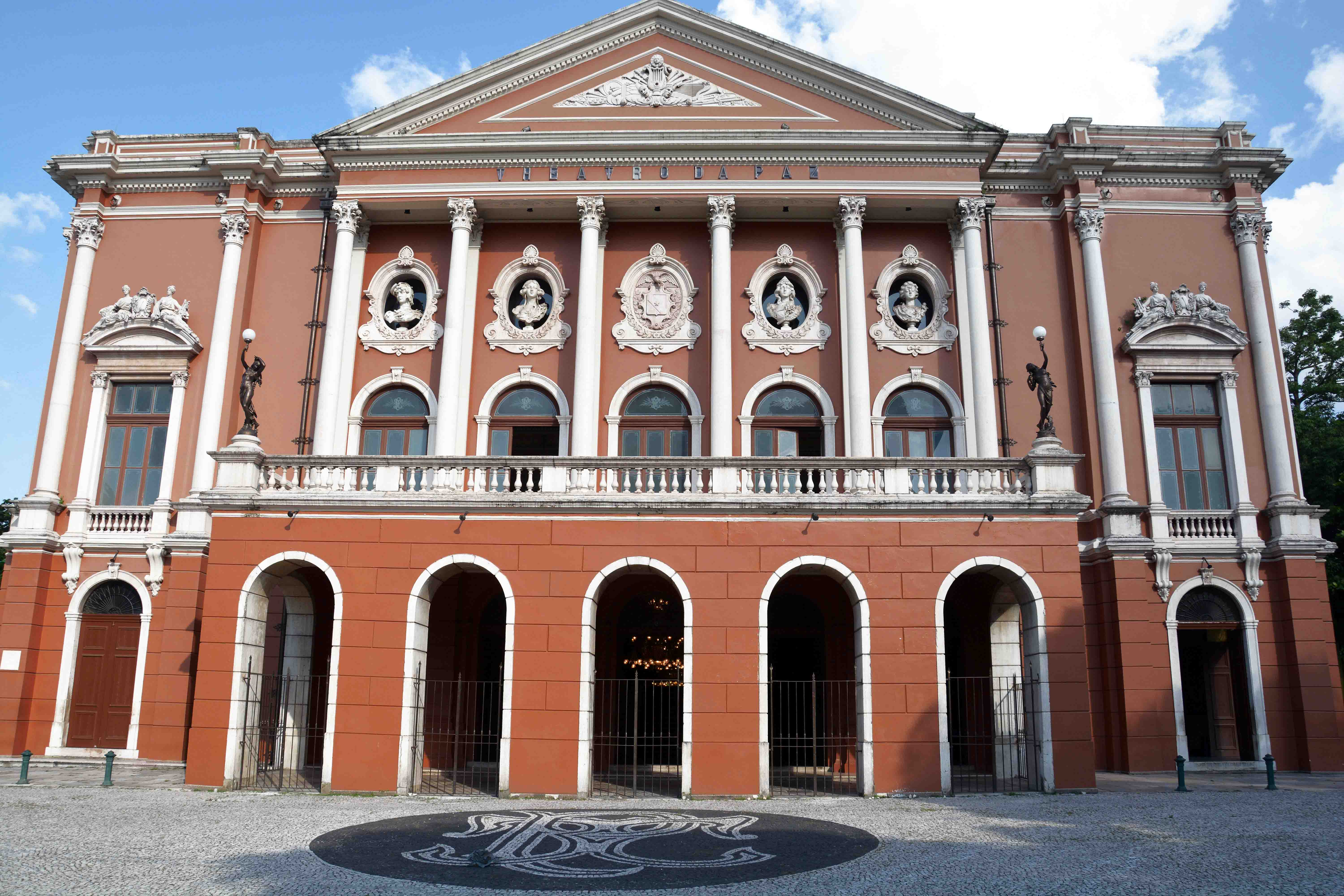 TEATRO N. SRA. DA PAZ - BELÉM